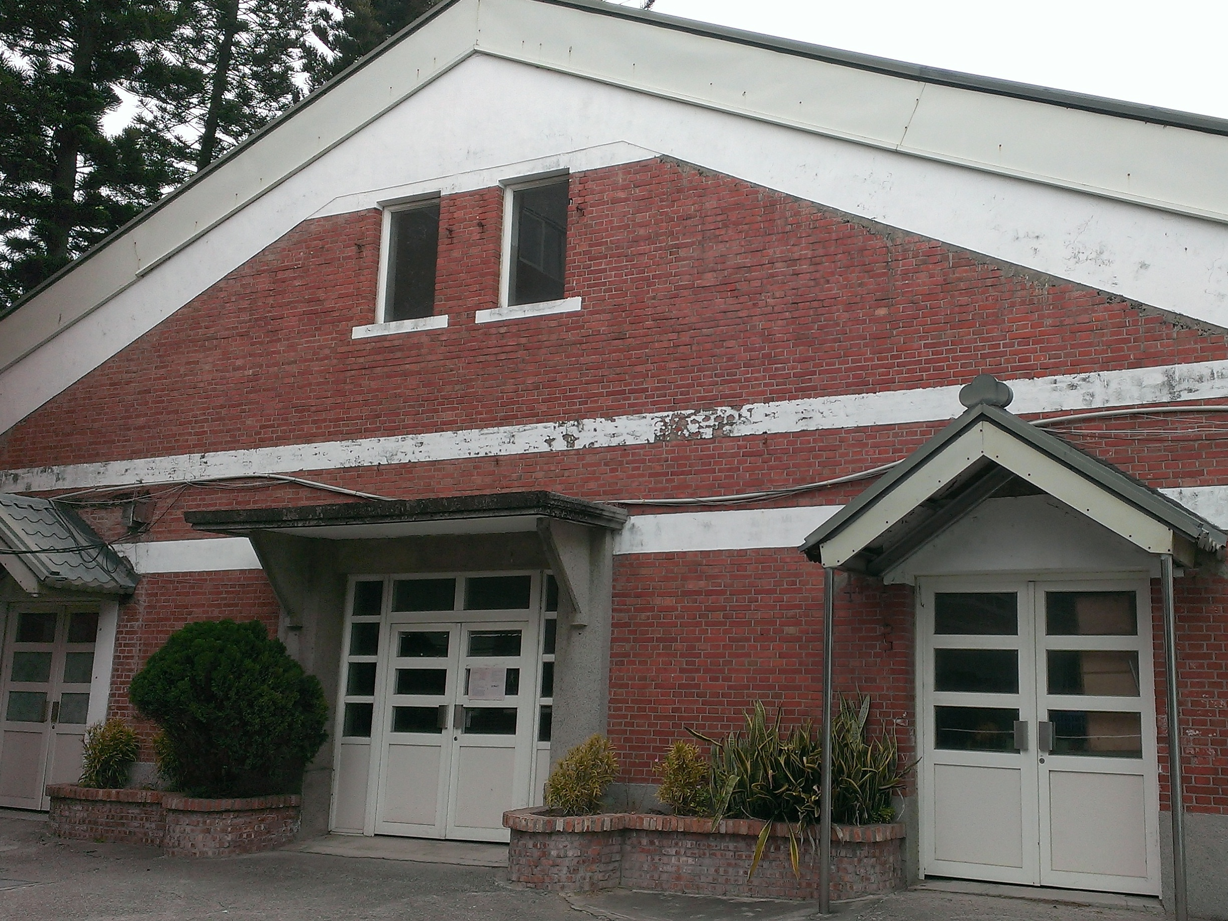 嘉義縣歷史建築，位於朴子市朴子國小